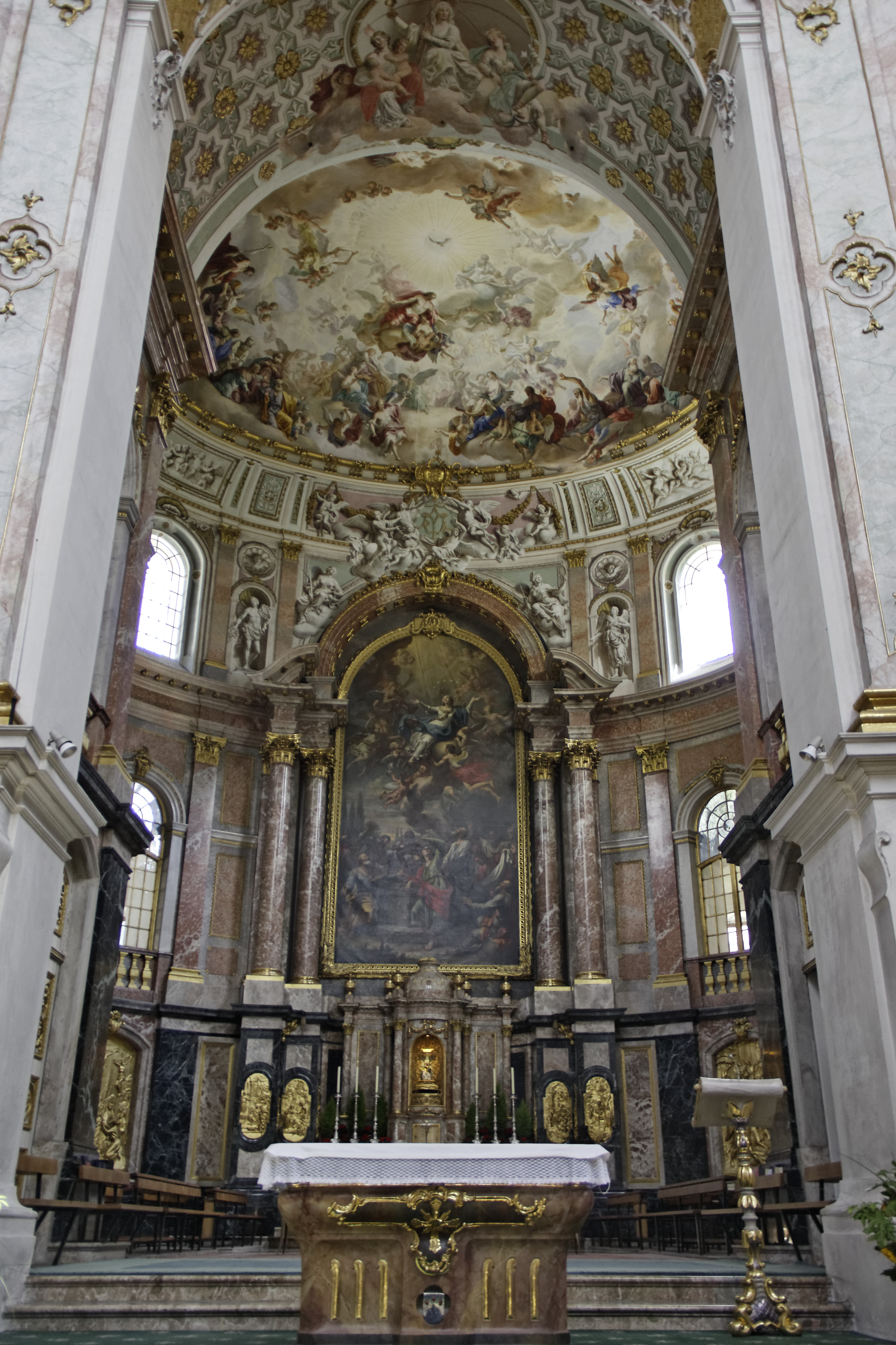 Der Altar der Klosterkirche St. Maria in EttalThis is a photograph of an architectural monument.